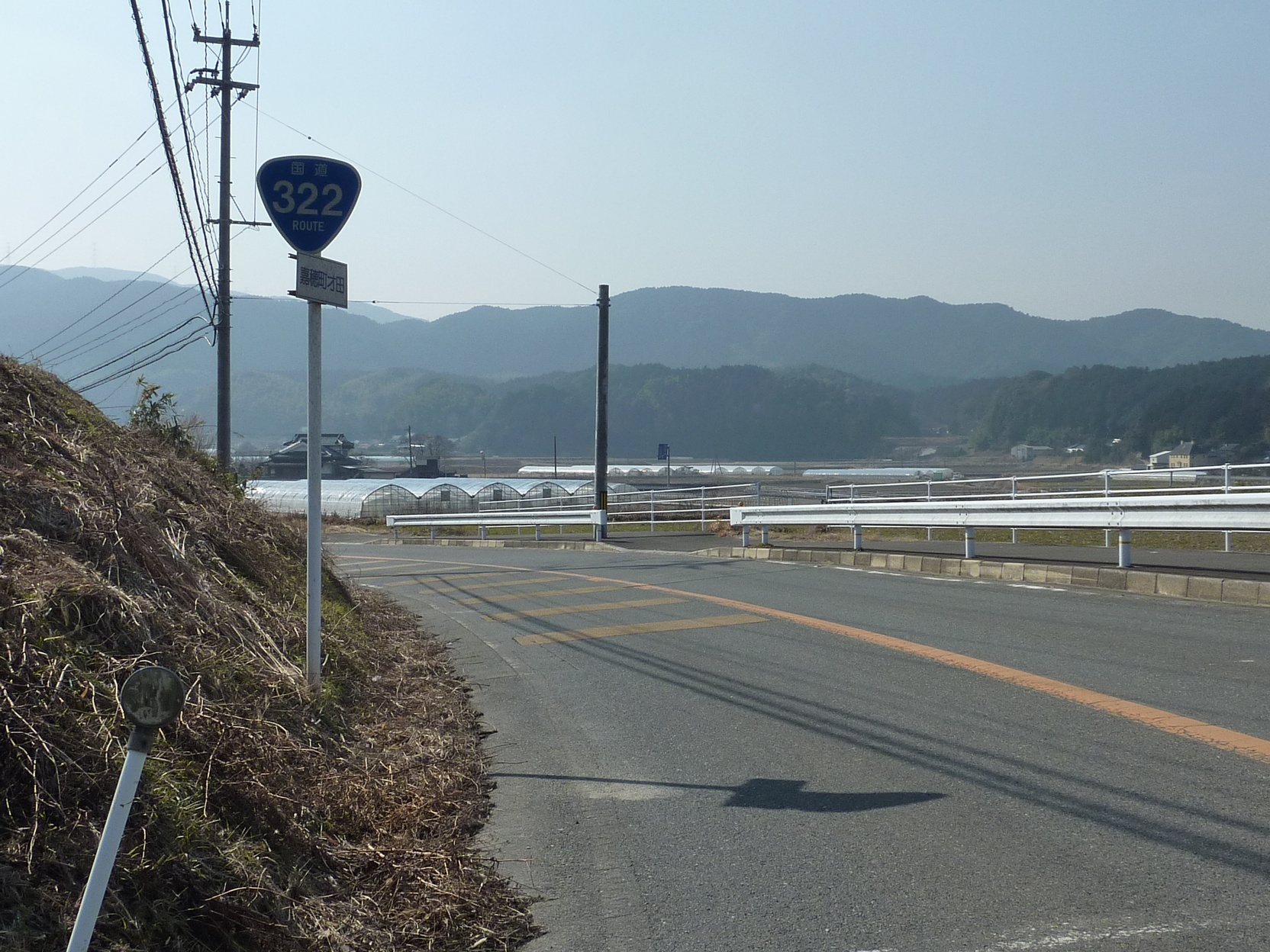 国道322号（福岡県嘉麻市嘉穂才田、秋月方面）